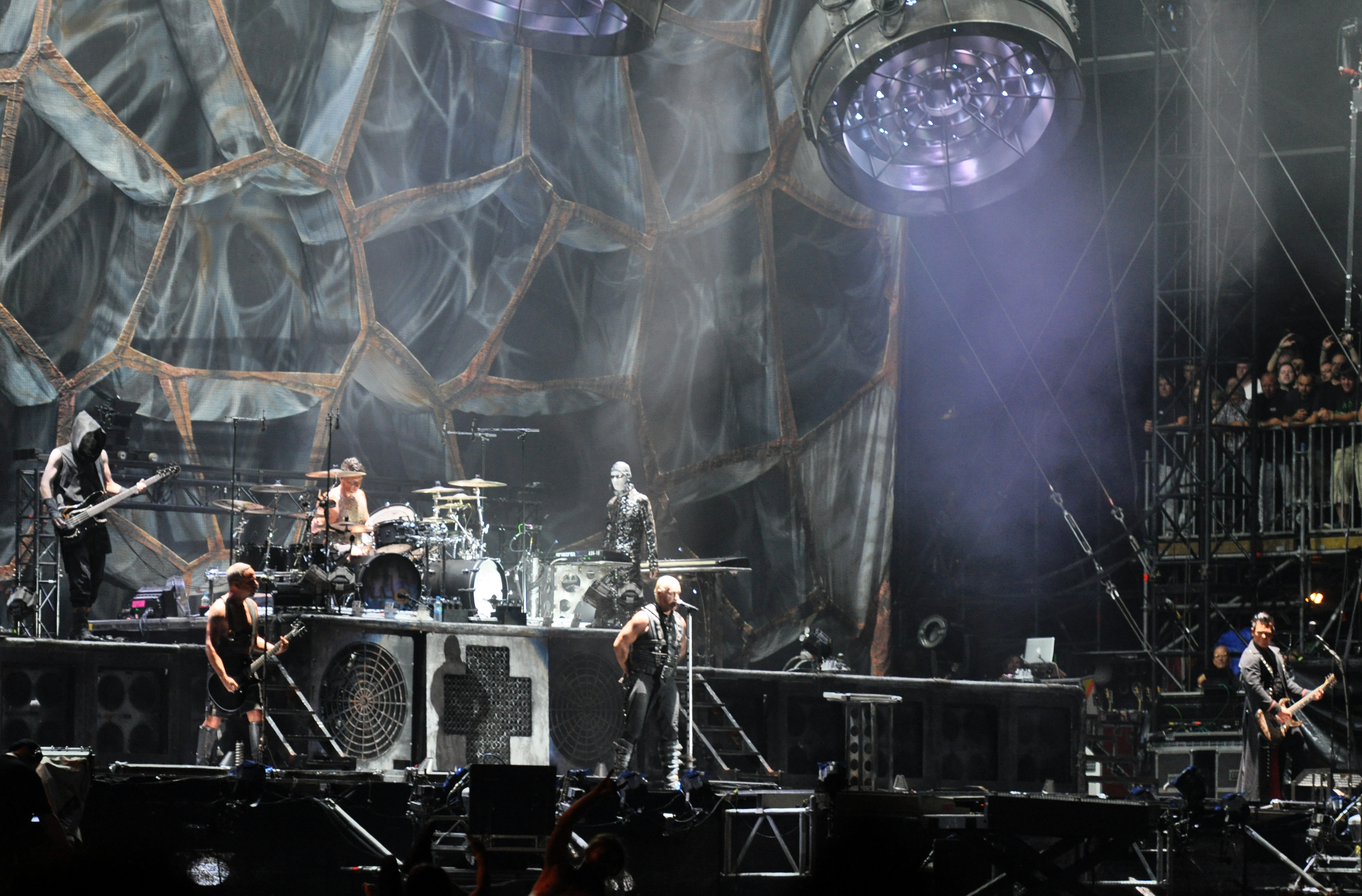 Rammstein at Wacken Open Air 2013